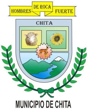 Escudo de chita